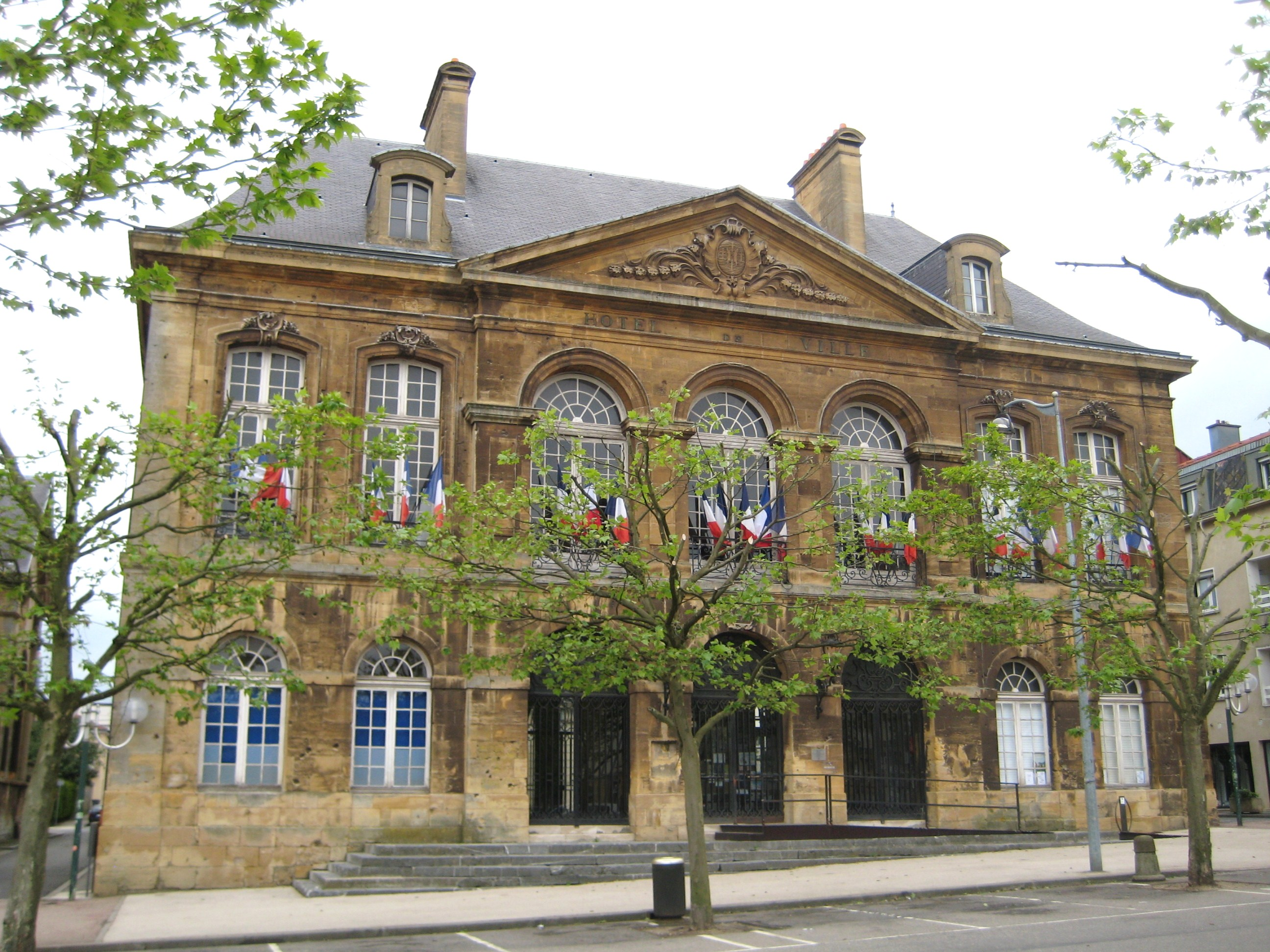 Description Ancienne Mairie de Longwy Date16 May 2009Sourcemon appareil photoAuthorAimelaime Ancienne Mairie de Longwy